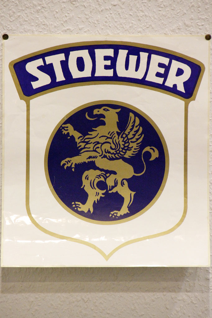 1939 Stoewer Logo_IMG_2866.JPG